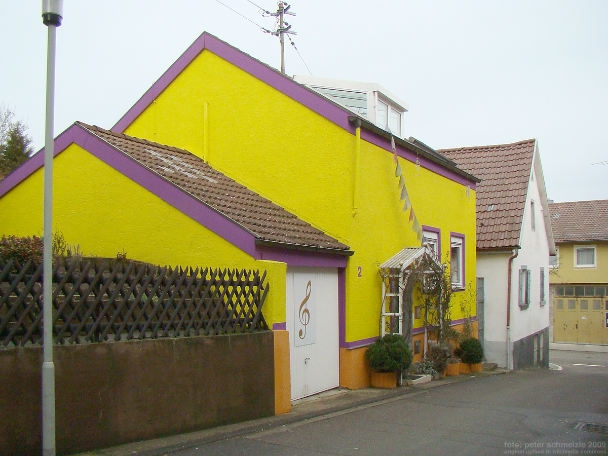 Heutige Bebauung des ehemaligen Synagogengrundstücks in Bad Rappenau